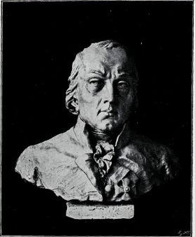 Jurij Vega